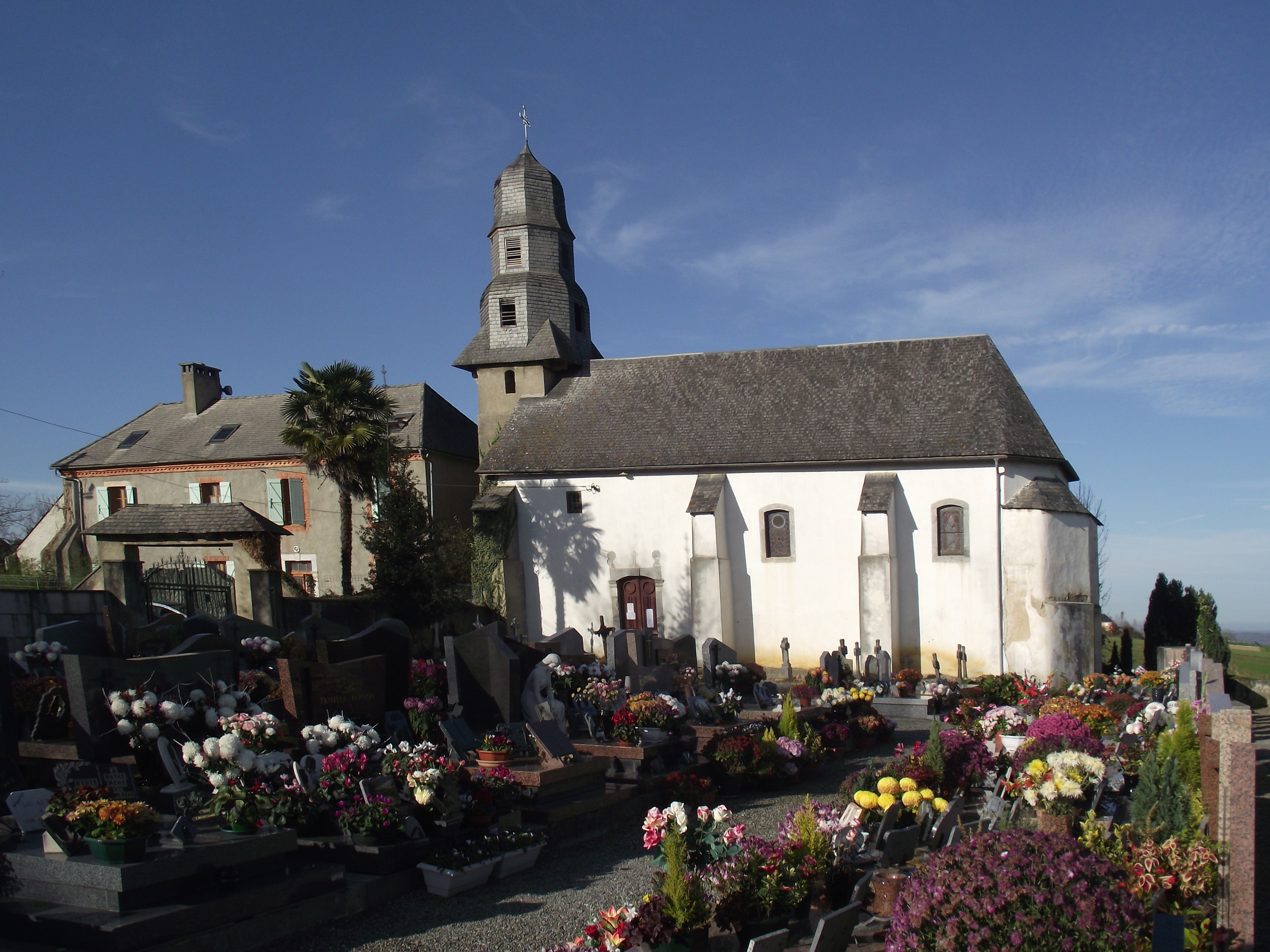 Église Saint-Jean-l'Évangéliste de Luc (Hautes-Pyrénées, France)